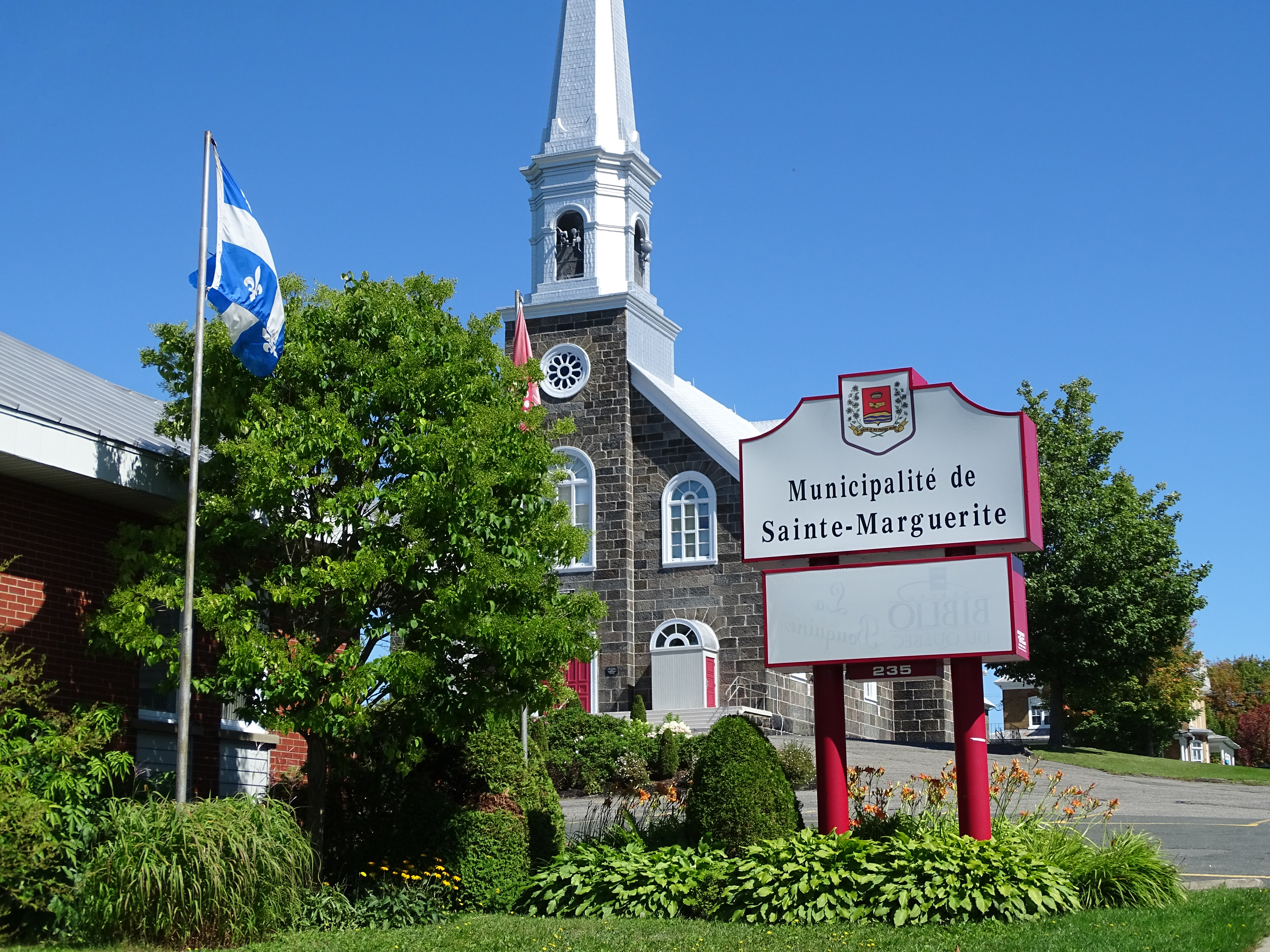 Sainte-Marguerite, Québec